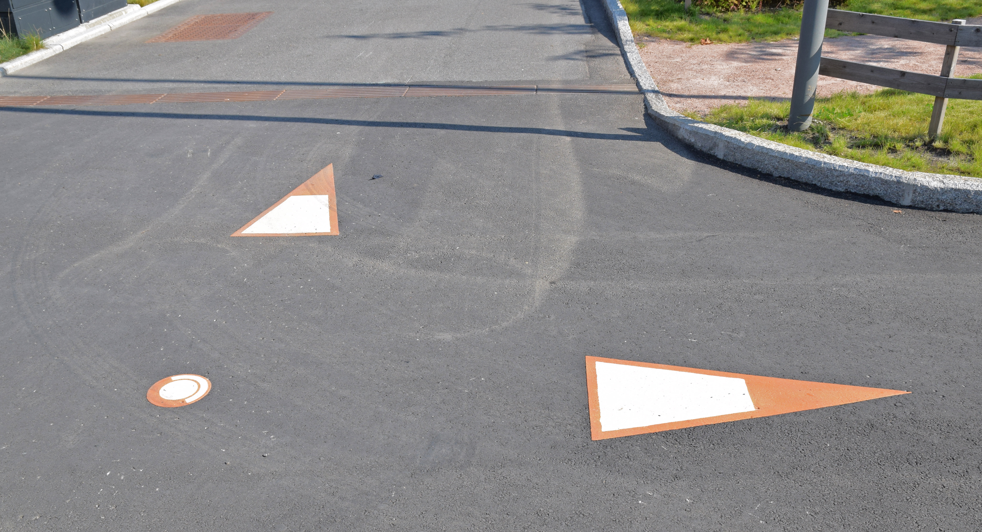 Havnepromenaden, Oslo, symbol som viser hvor promenaden går. Tatt på Langkaia i Bjørvika